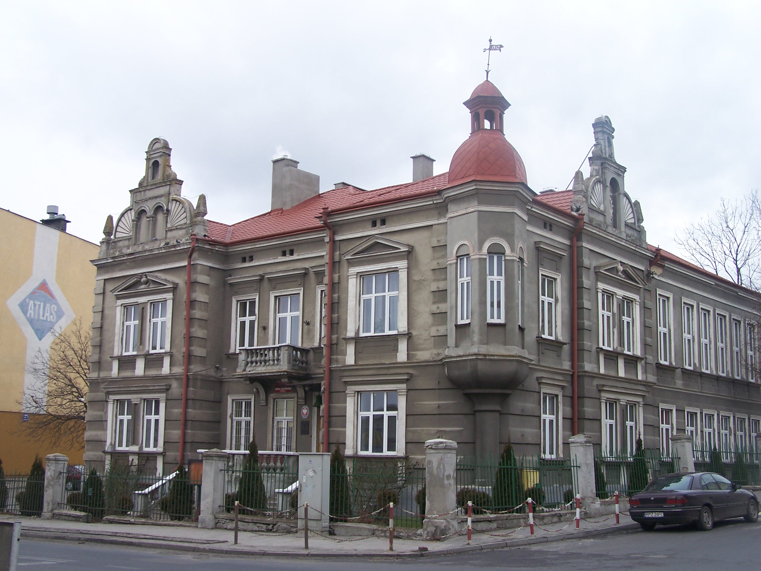 Budynek Państwowej Szkoły Muzycznej w Przeworsku z 1912 r. Zdjęcie sprzed renowacji.